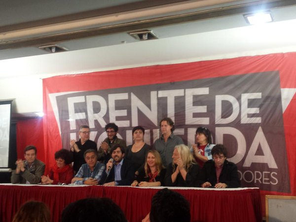 22.50 Habla del Caño. "Hemos superado el millón de votos"